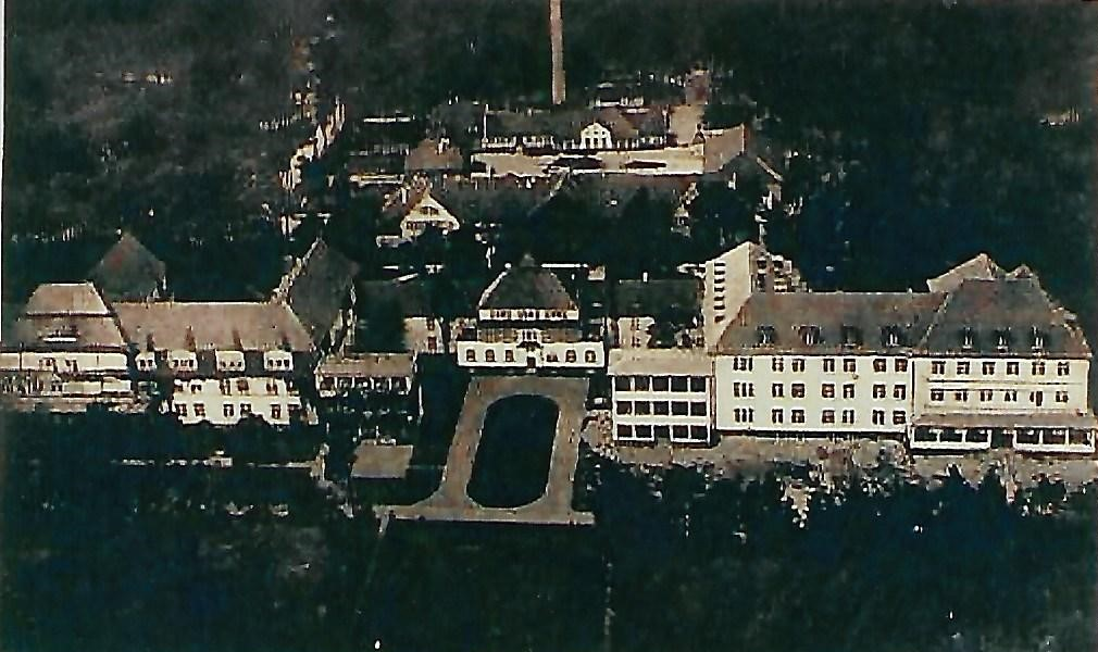 Luftaufnahme des Krankenhauses Hohenkrug bei Stettin